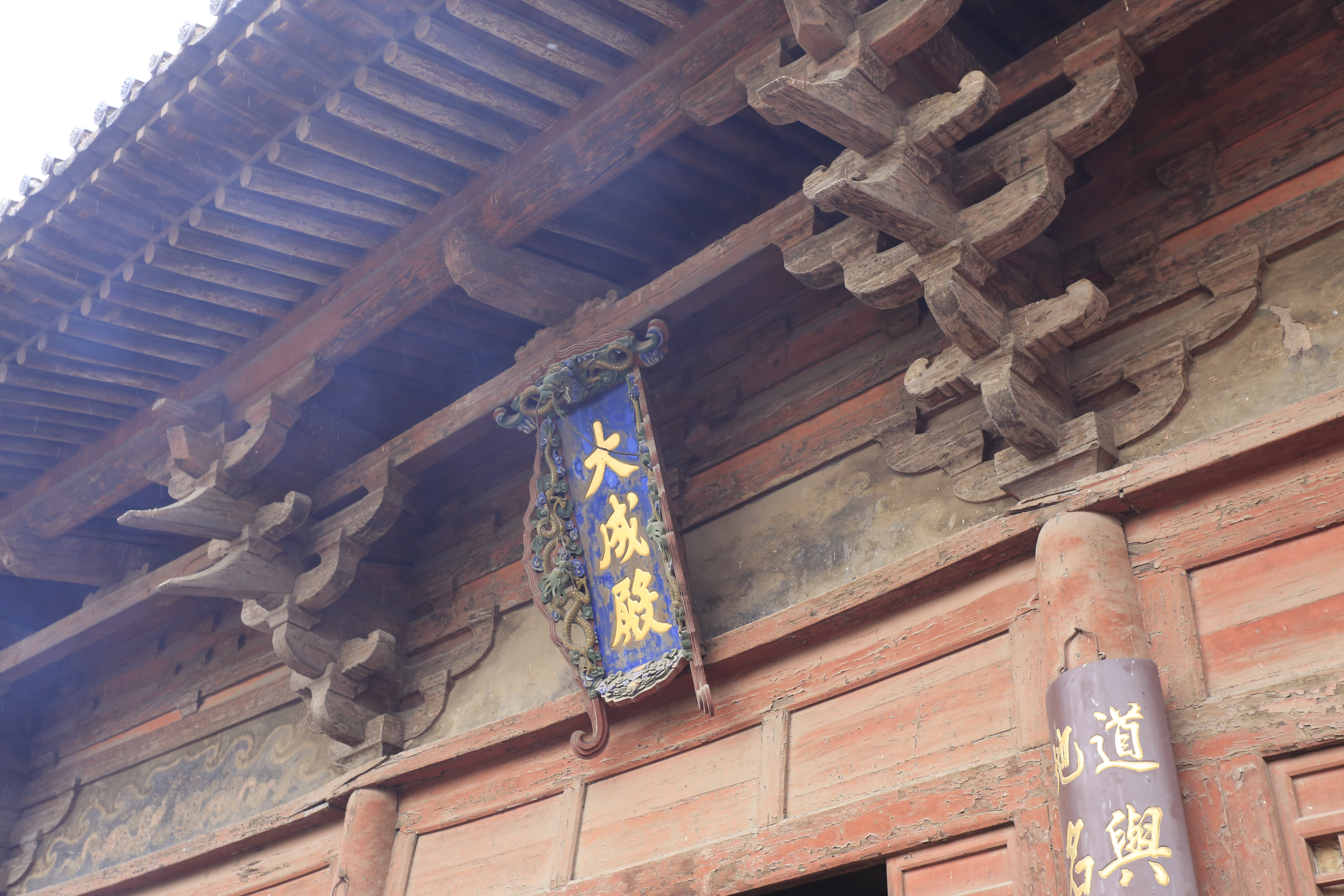 平遥文庙 —— 大成殿前檐